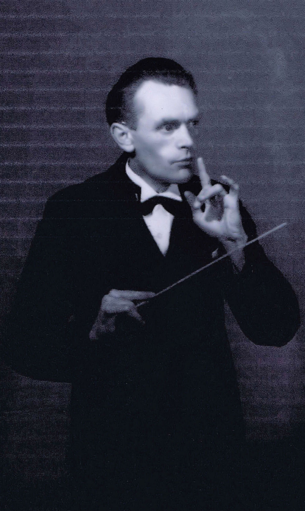 Sake Lieuwe Tiemersma